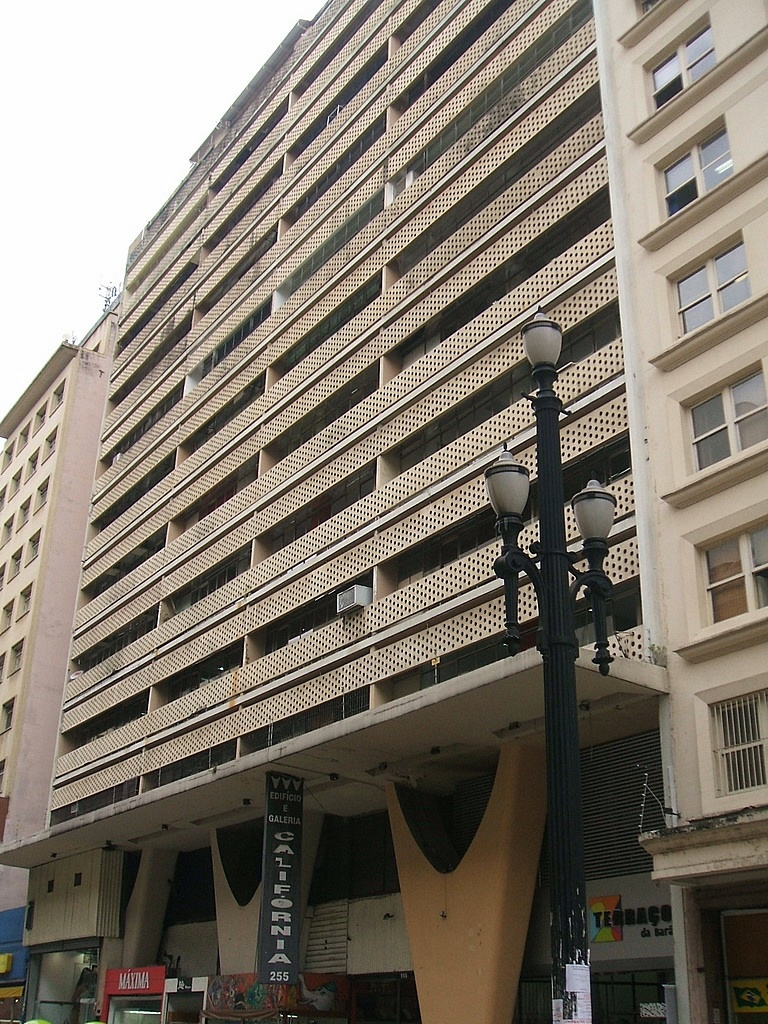 Edifício Califórnia, na rua Barão de Itapetininga, cidade de São Paulo, Brasil. Obra de Oscar Niemeyer, de 1951.